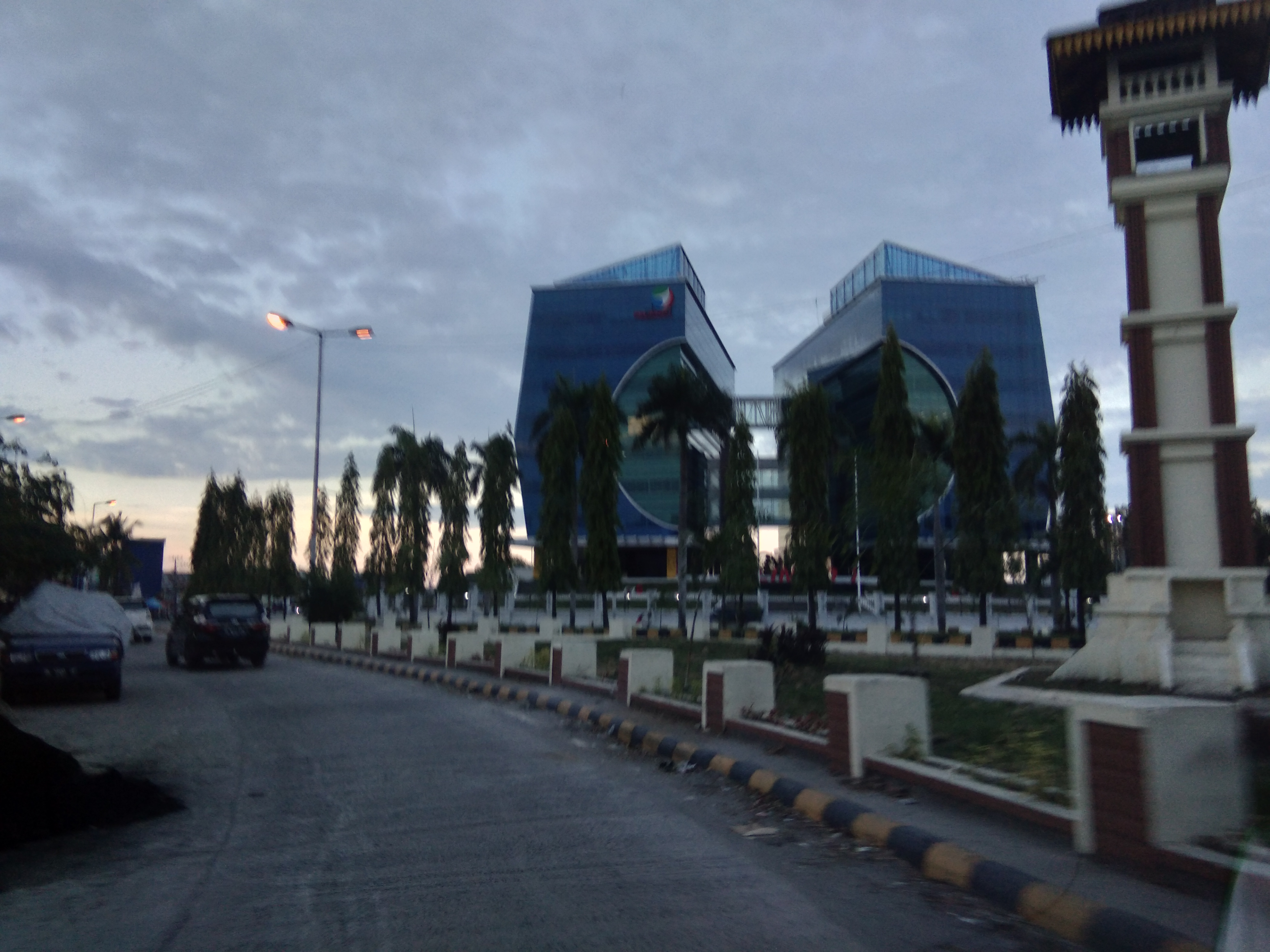 Gedung tertinggi di kecamatan medan belawan